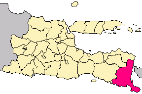 Carte indonésienne